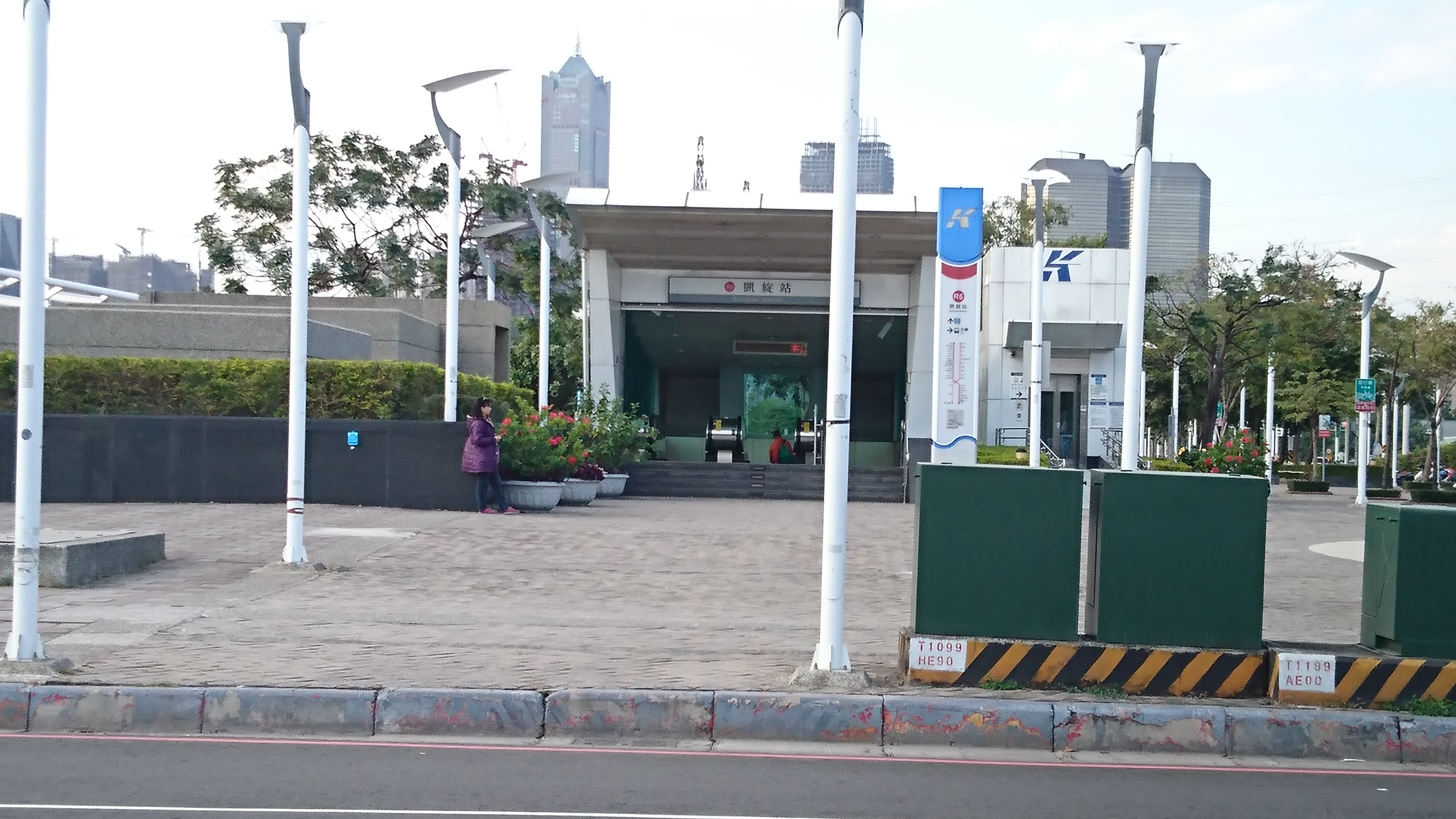 捷運凱旋站一號出口